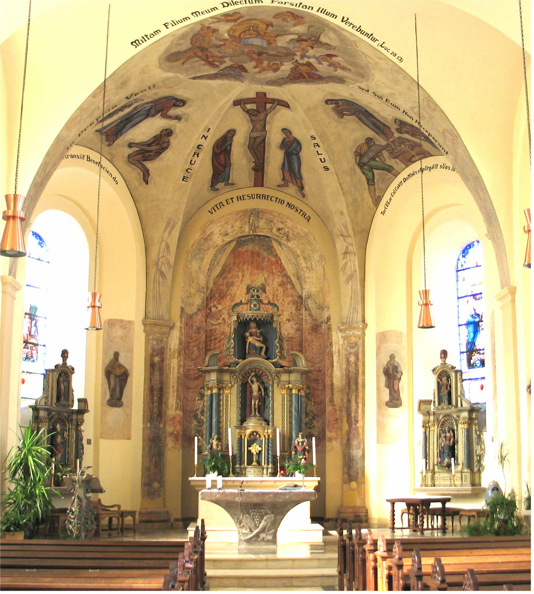 Sujet: Chouer an der Kierch vu Rëmerschen.